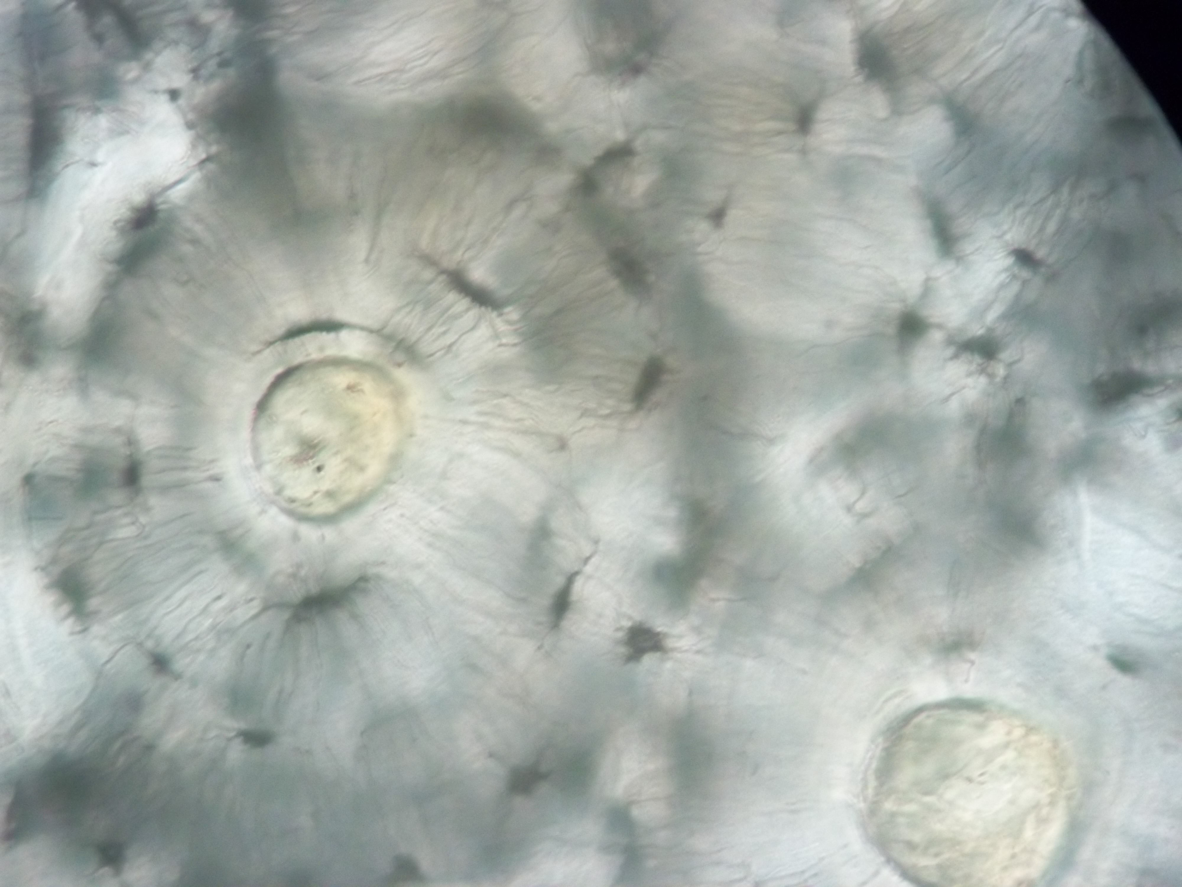 Micrografía de un corte de hueso seco. 400X.